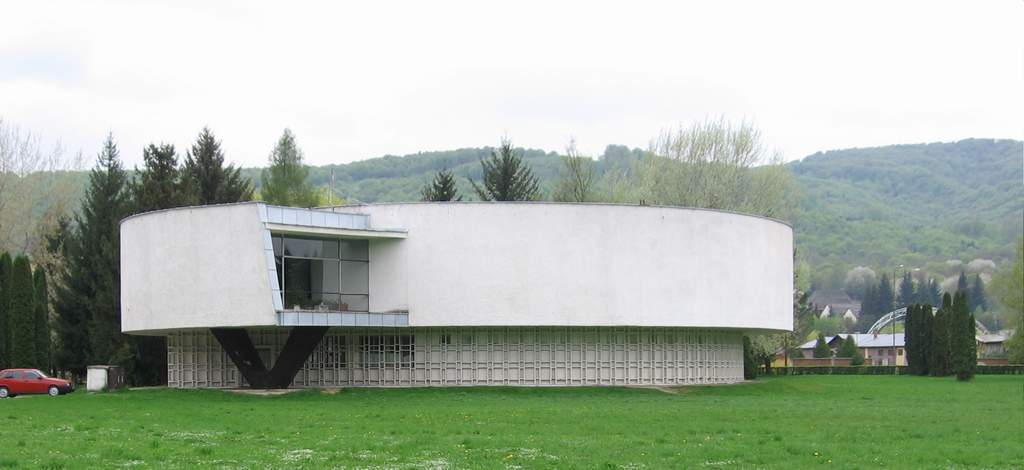 Svidník war museum building.